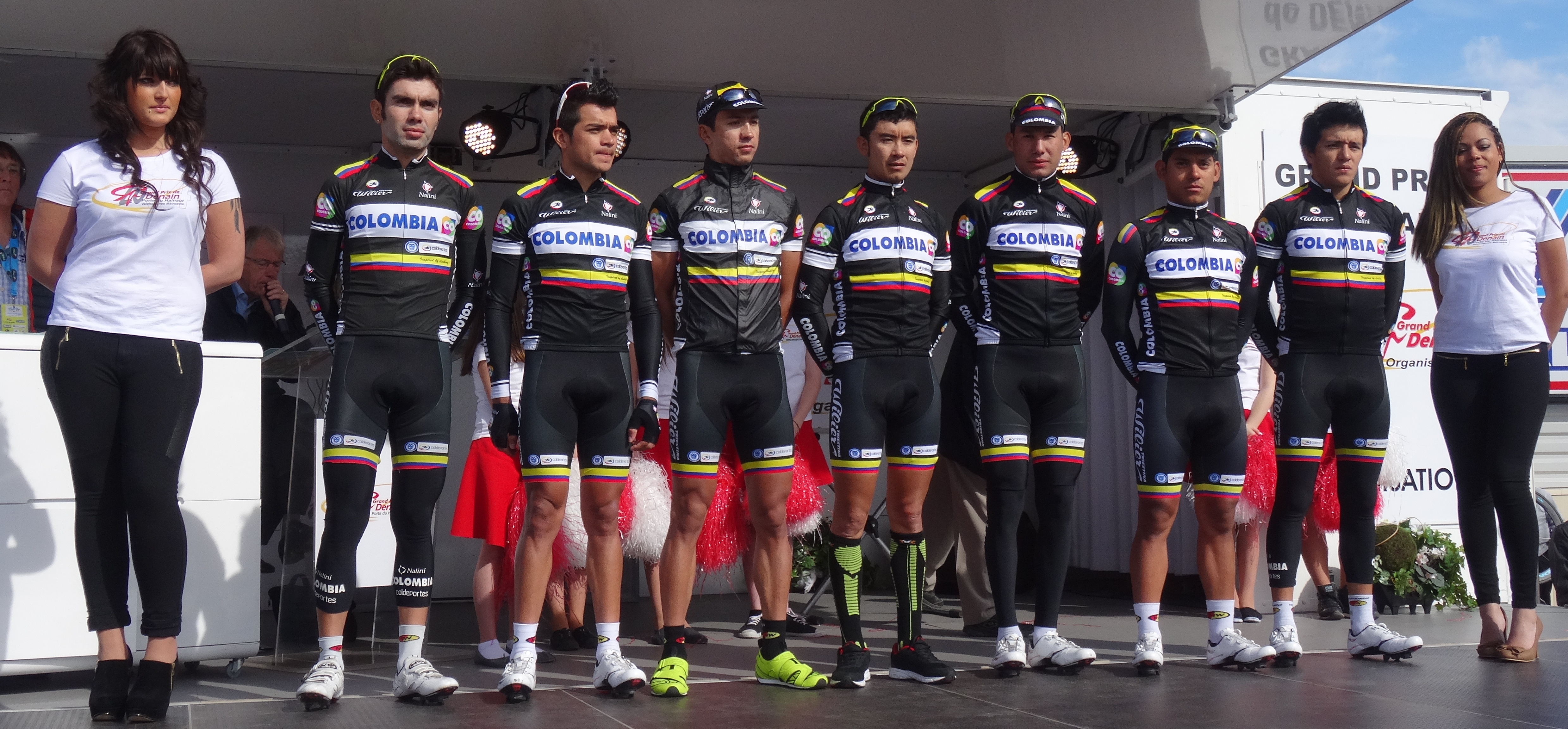 Reportage réalisé le jeudi 17 avril à l'occasion du départ et de l'arrivée du Grand Prix de Denain 2014 à Denain, Nord, Nord-Pas-de-Calais, France.